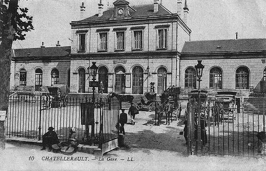 Le bâtiment voyageurs et la cour de la gare de Châtellerault vers 1900.